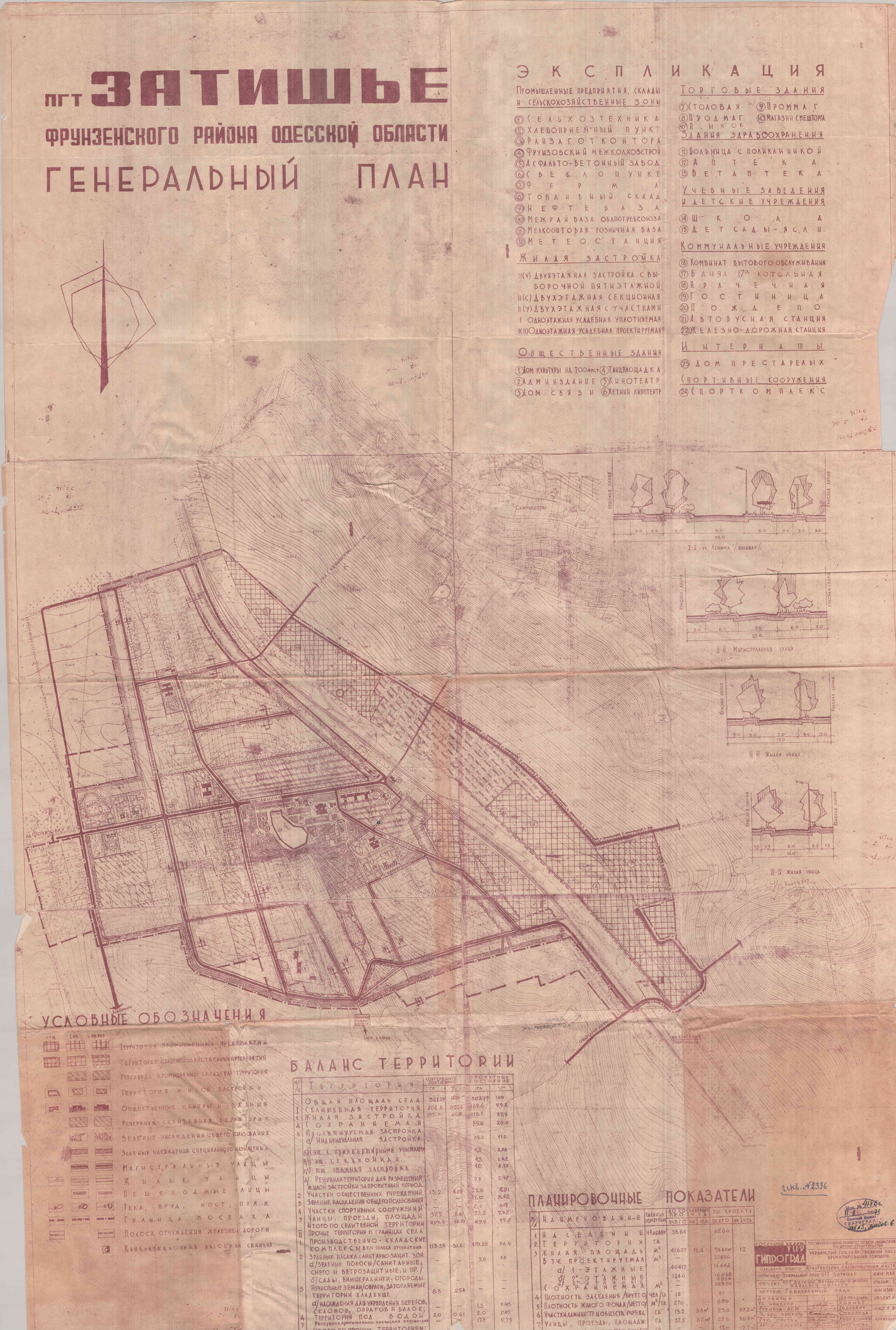 Нереалізований план перебудови Затишшя в місто, 1973-й рік схвалення